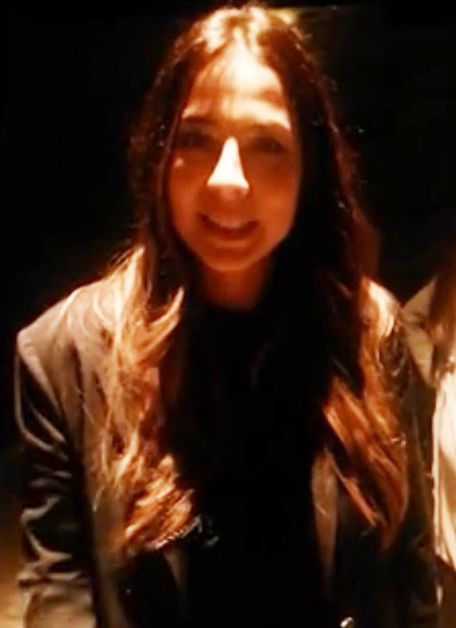 Carla Giraldo mandando un saludo a Movierama Magazine